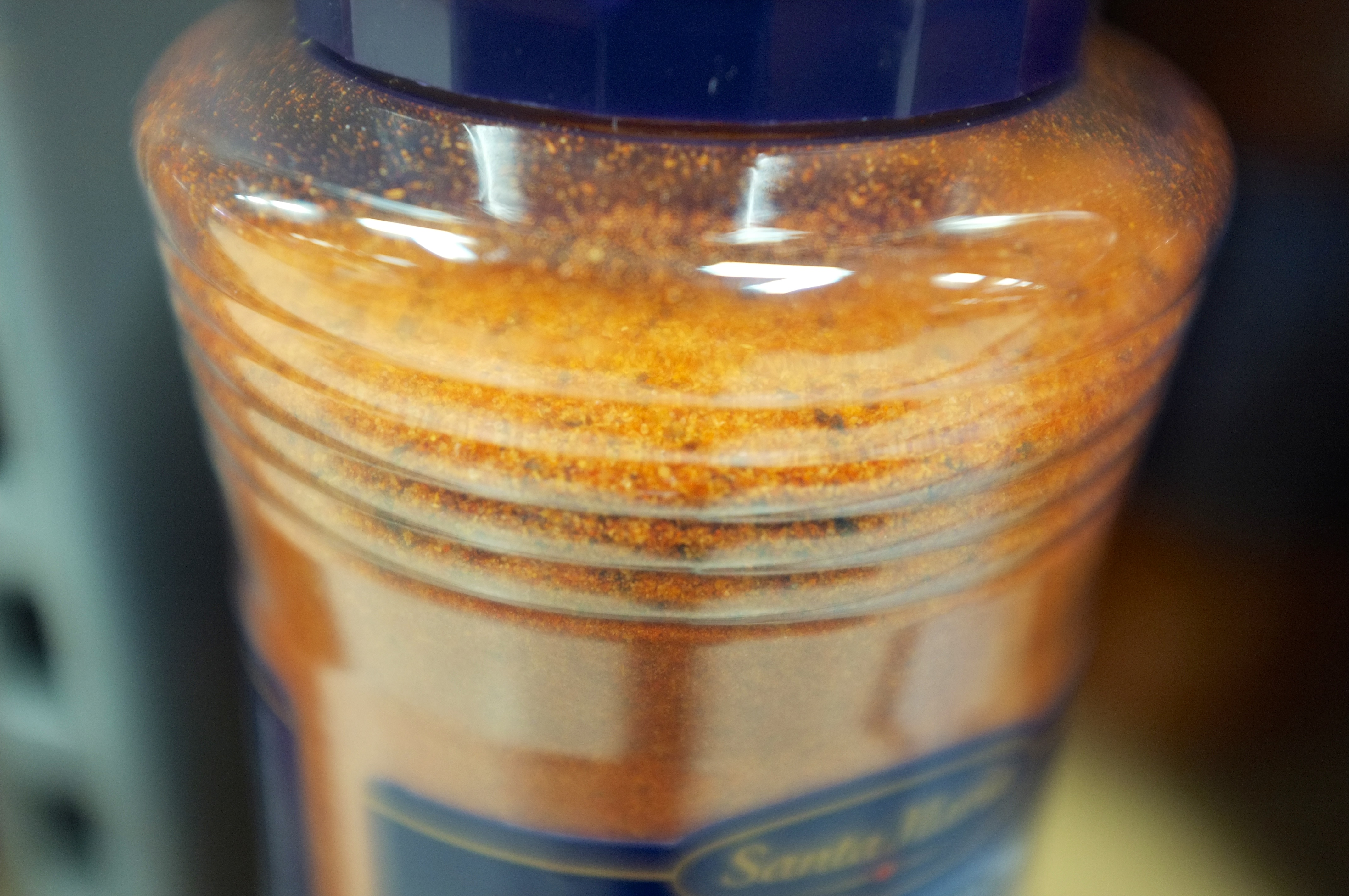 Grillkrydder..